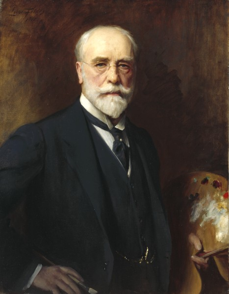 Self-portrait Sir Samuel Luke Fildes RA (1843-1927)